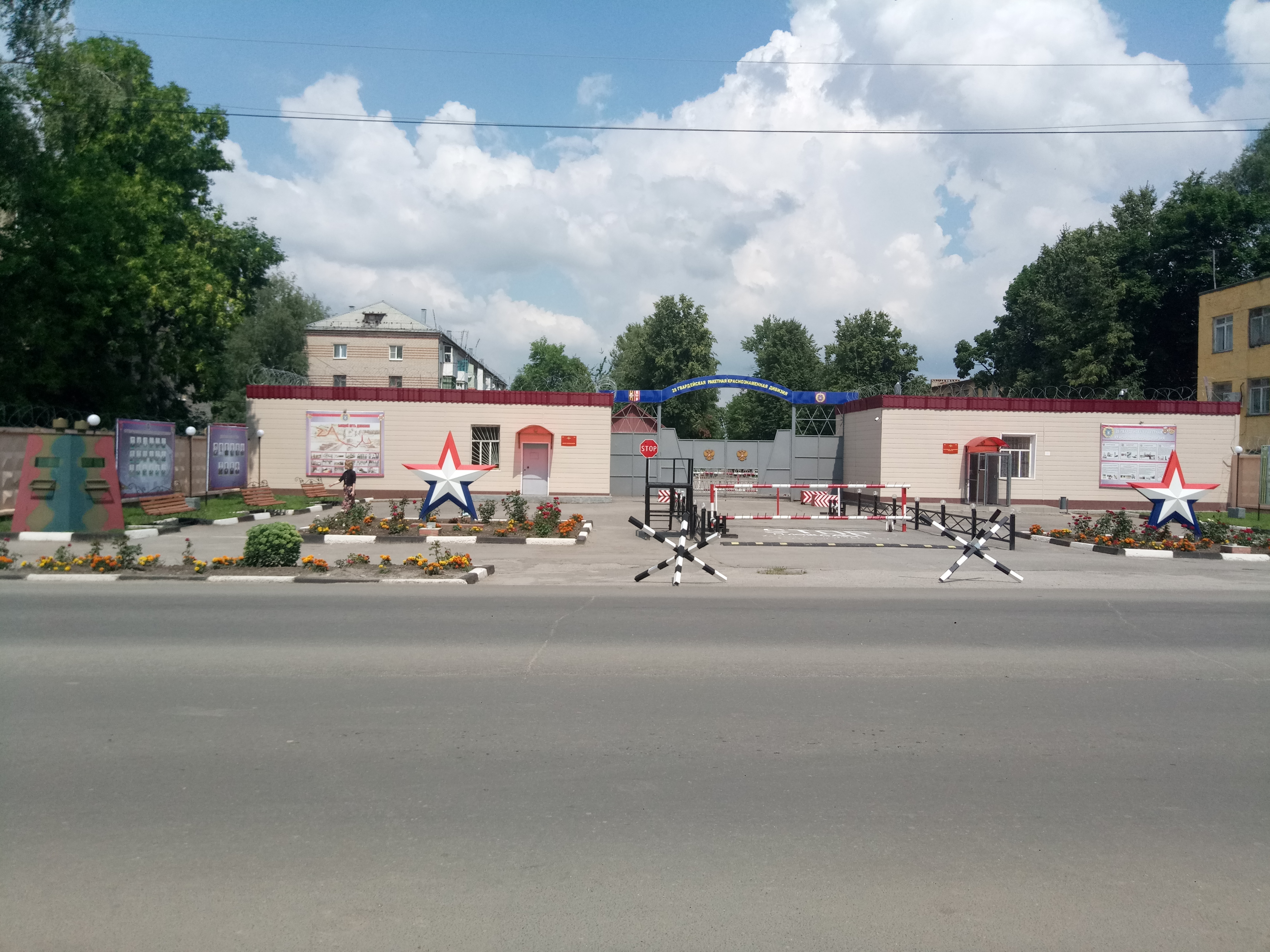 Хочешь попасть в Америку - иди служить в 28-ую гвардейскую ракетную дивизию!